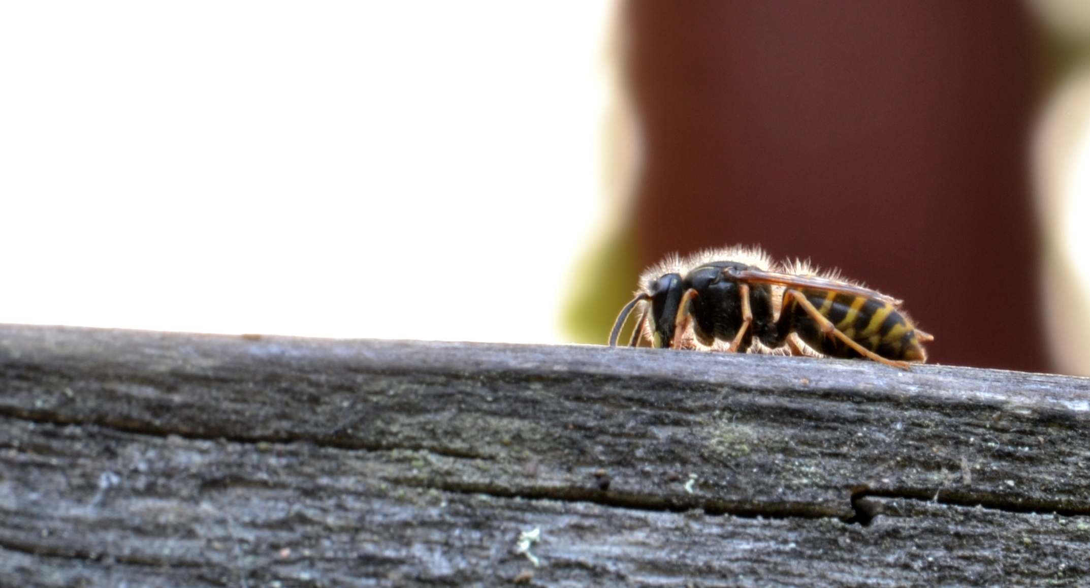 Vespula vulgaris ryömii puupalan päällä.